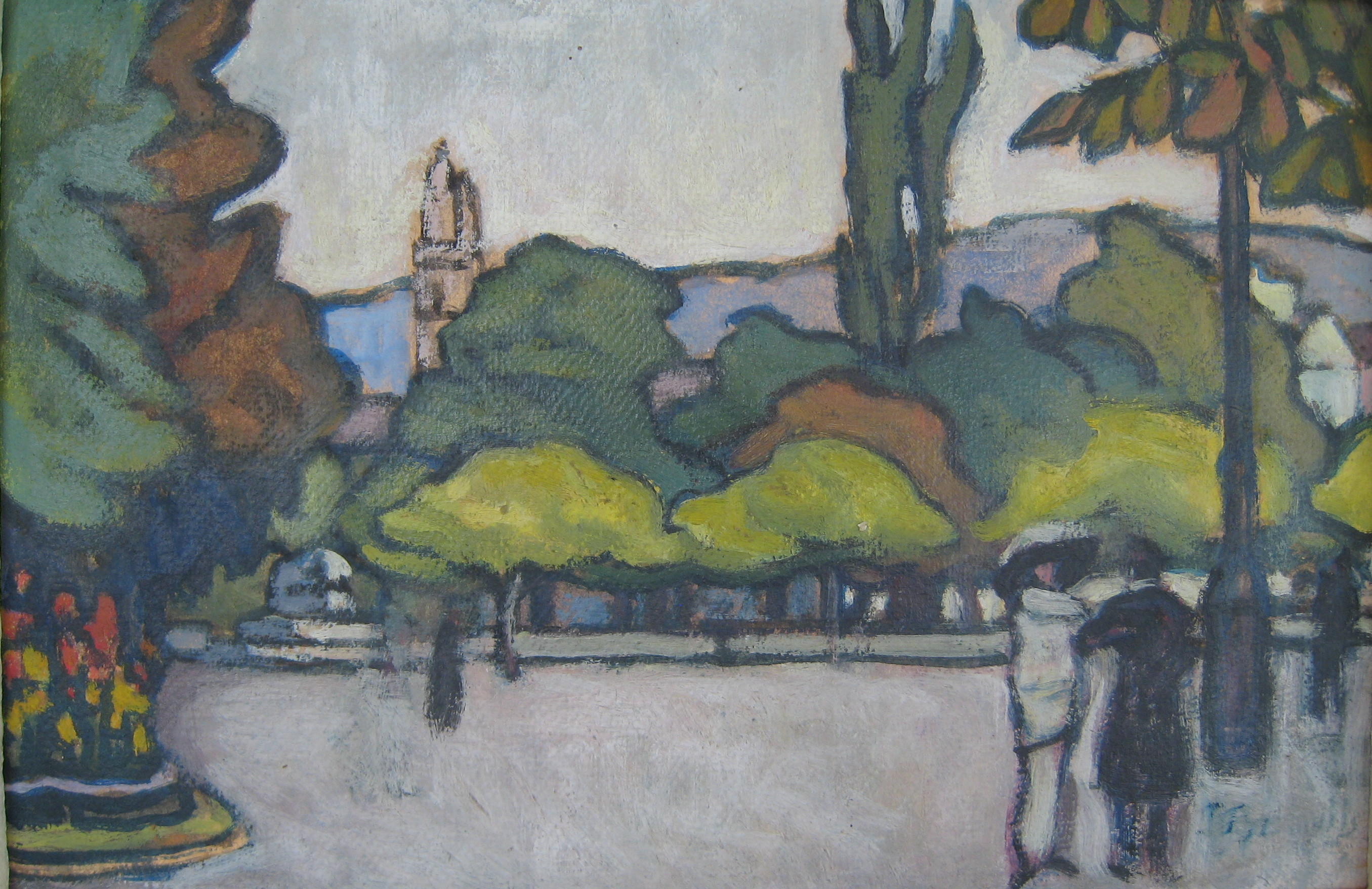 Öl auf Karton 20x29,5 cm